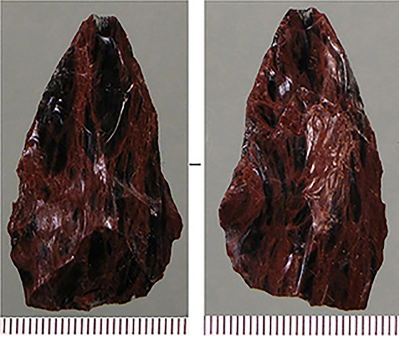 Орудие из обсидиана из слоя 6В грота Сарадж-Чуко